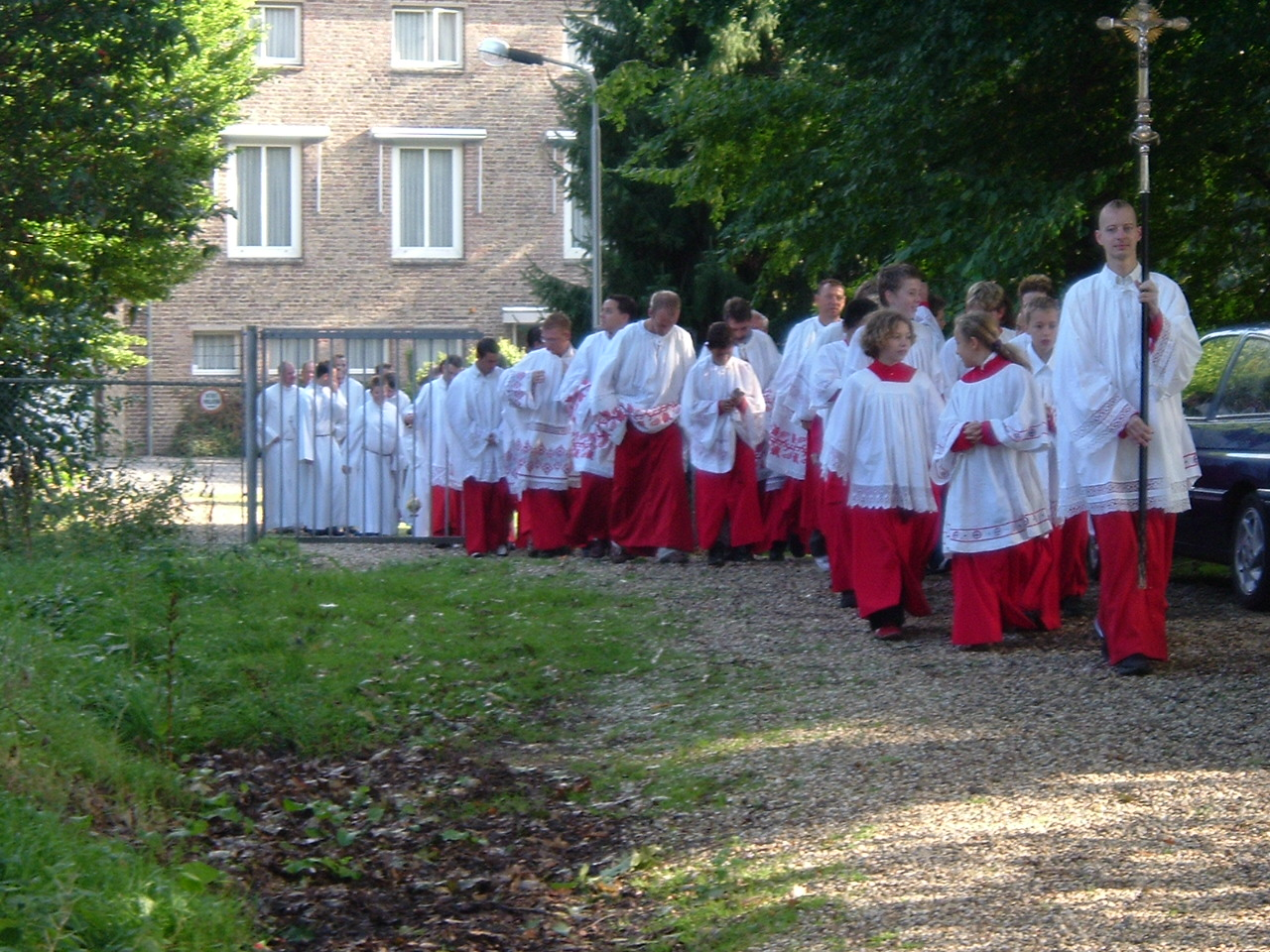 eigen foto, september 2004